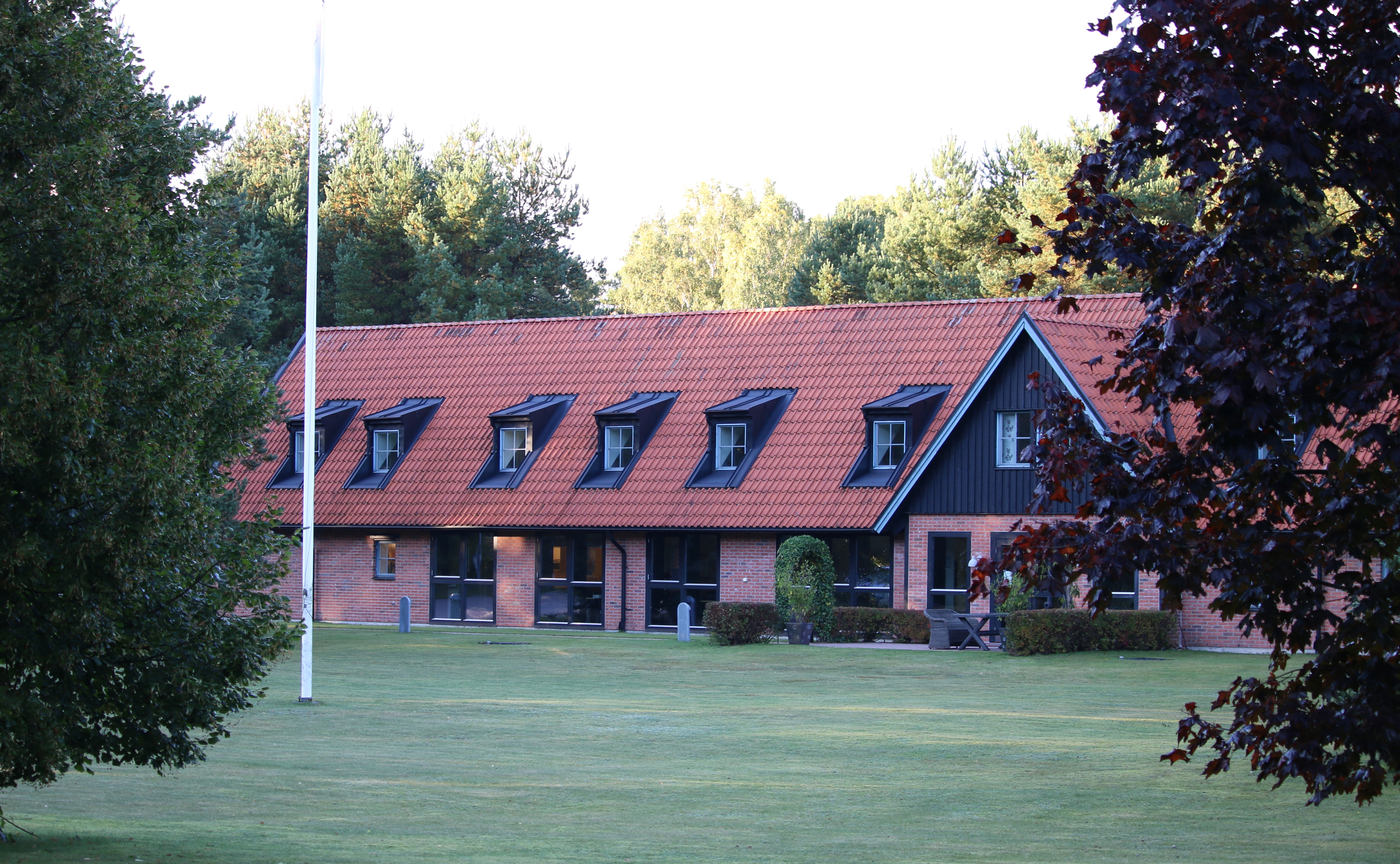 Nämndemansgården i Blentarp